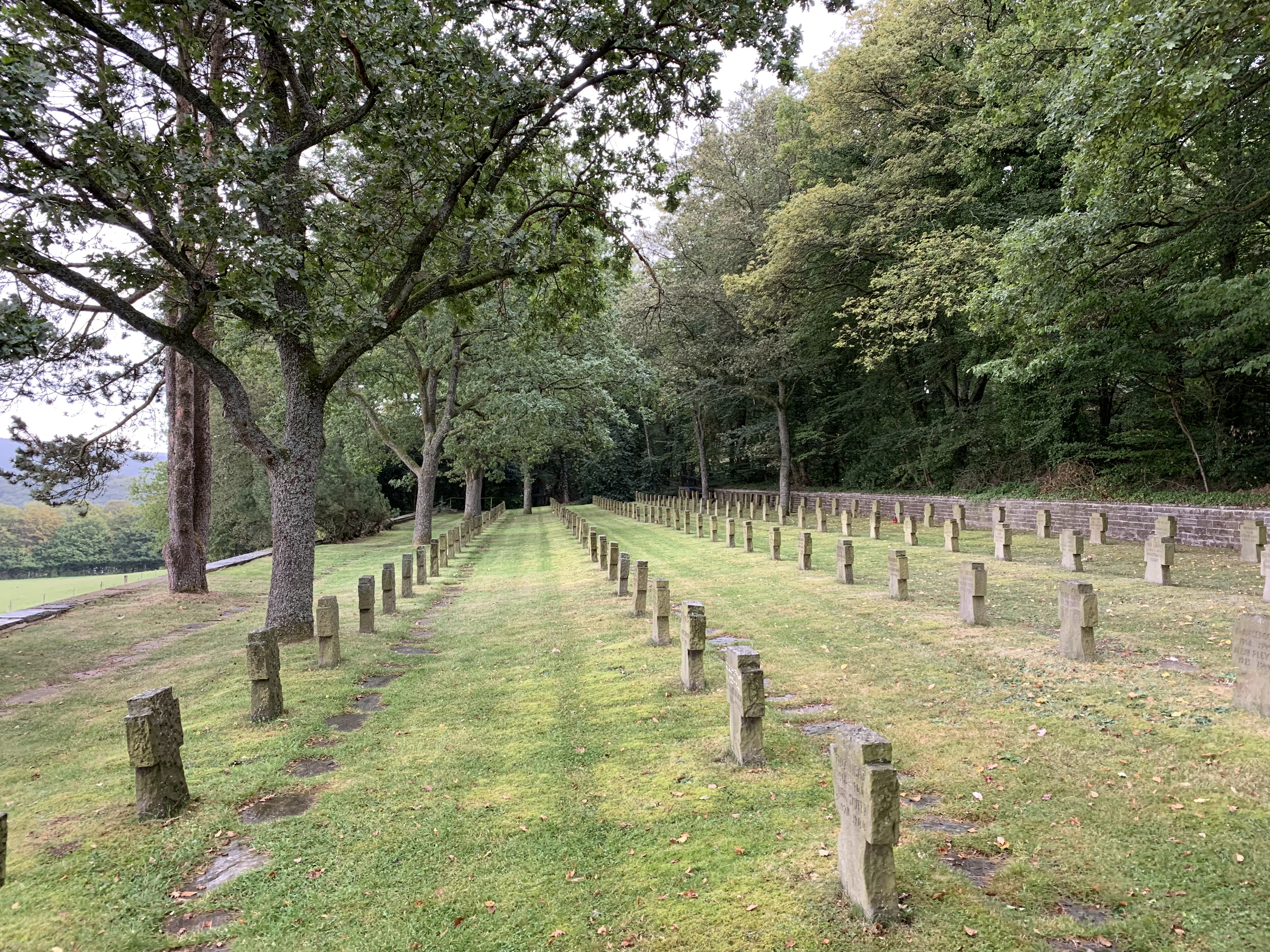 Die Kriegsgräberstätte Heimbach ist eine Kriegsgräberstätte in Heimbach im Kreis Düren in Nordrhein-Westfalen. Dort liegen 414 Gefallene aus dem Zweiten Weltkrieg.